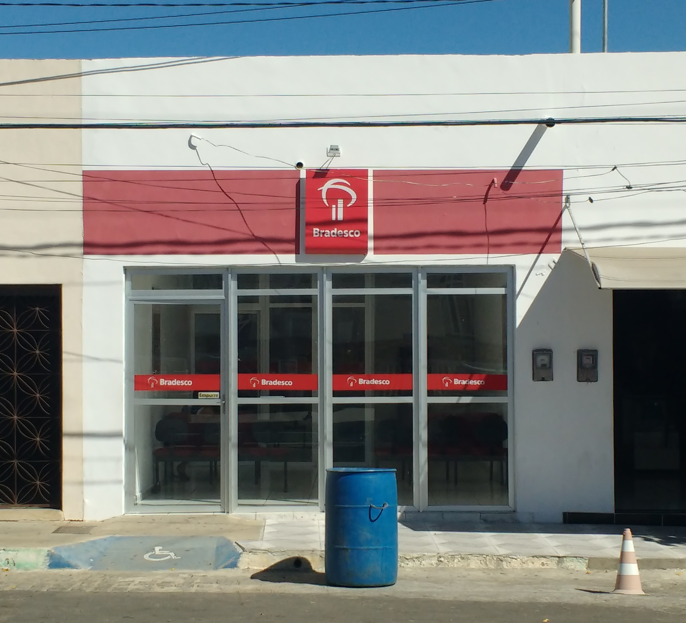 Agência bancária do Bradesco em Tenente Ananias, Rio Grande do Norte (Brasil).